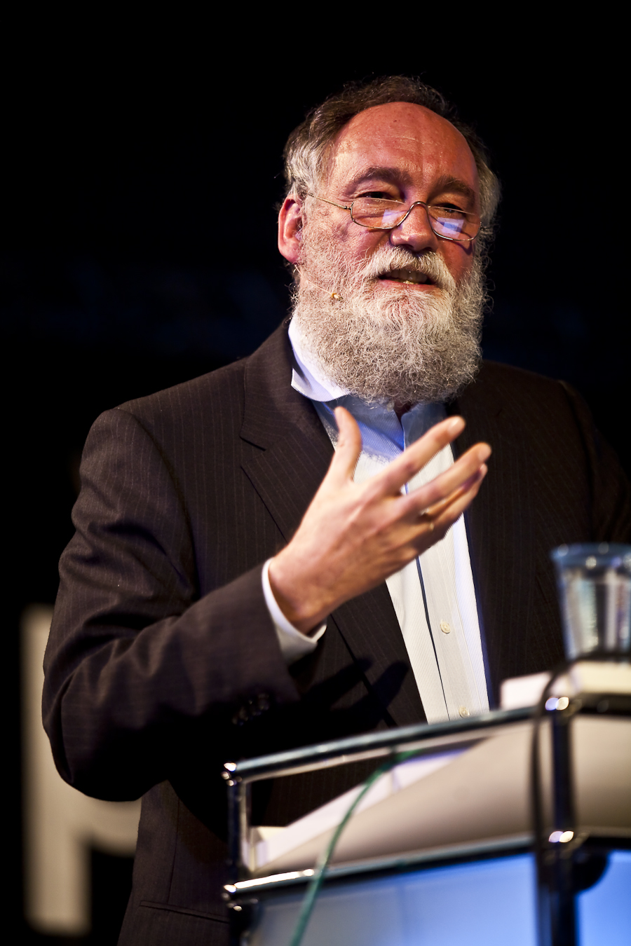 Professor Peter Kruse bei seinem Vortrag "What's next: Wie die Netzwerke Wirtschaft und Gesellschaft revolutionieren" auf der re:publica. Photo by Daniel Seifert